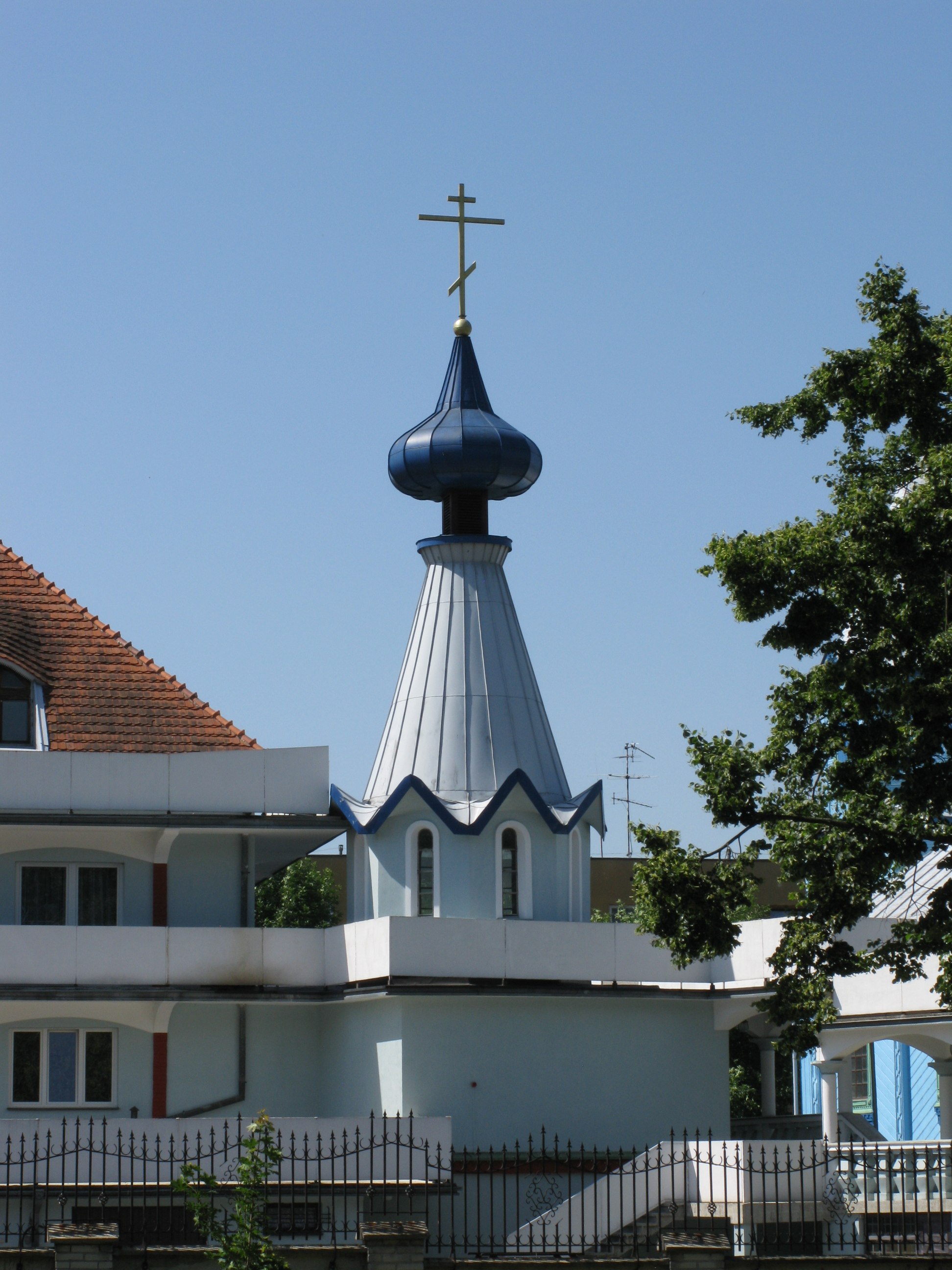 Kaplica domowa – baptysterium św. Jana Chrzciciela w Bielsku Podlaskim. Widok od strony Parku Królowej Heleny.